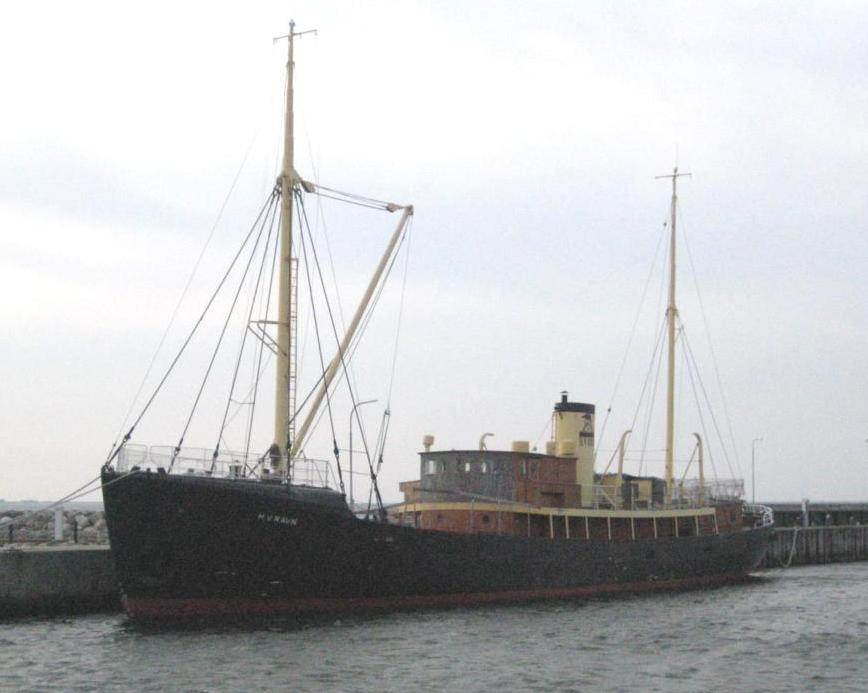 H. V. Ravn i Hundested 4 oktober 2010